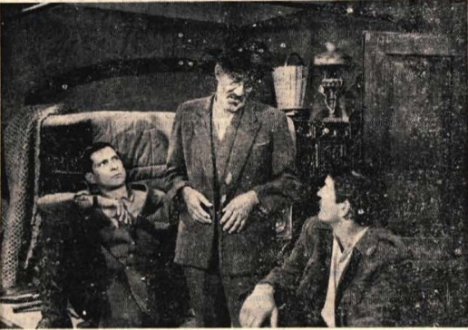 Prizor iz Pete zasede. Od leve proti desni: Boris Cavazza, Jože Zupan in Tone Gogala.